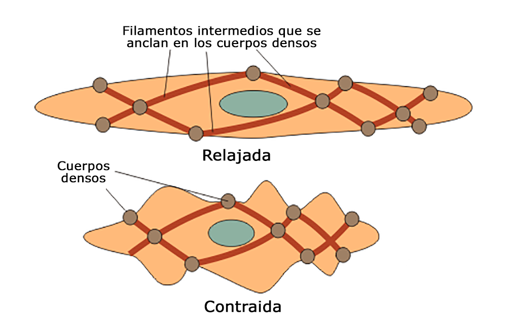 Esquema en el que se muestra la contracción de una célula del músculo liso.